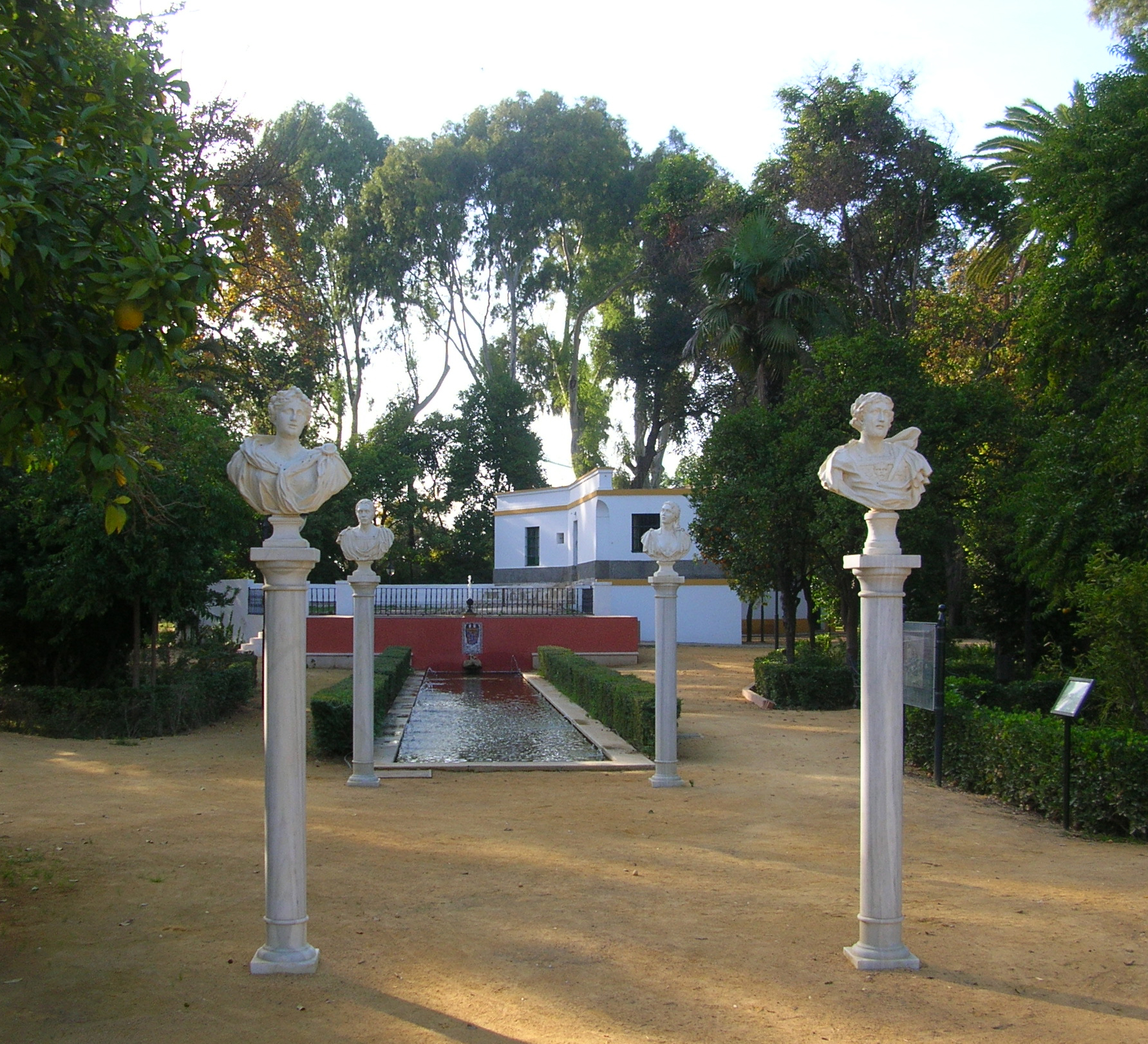 Jardines de las Delicias, Sevilla, España